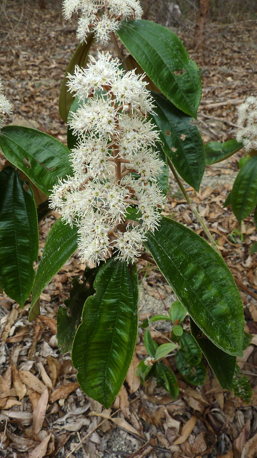 Miconia amoena Triana